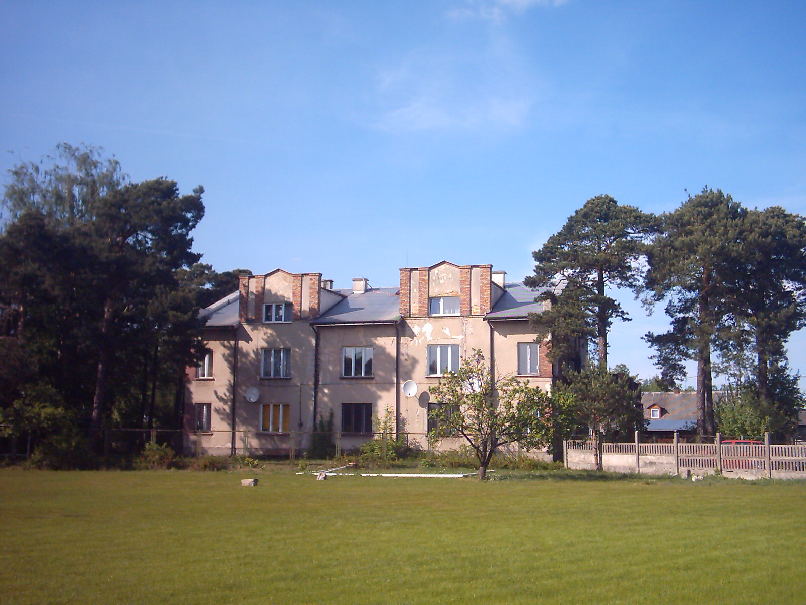 Osiedle Chemiczna - budynek z lat 30. XX w.